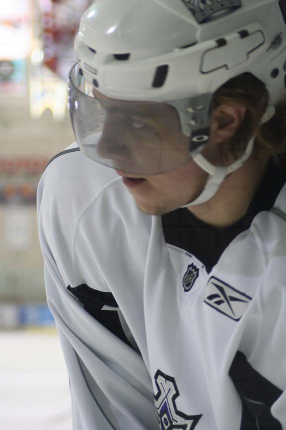 Anže Kopitar in 2007